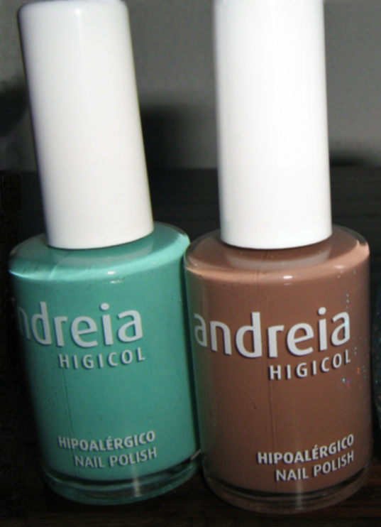 Da esquerda para a direita: Andreia 107 Andreia 79 Cropped and edited by Eduarda7